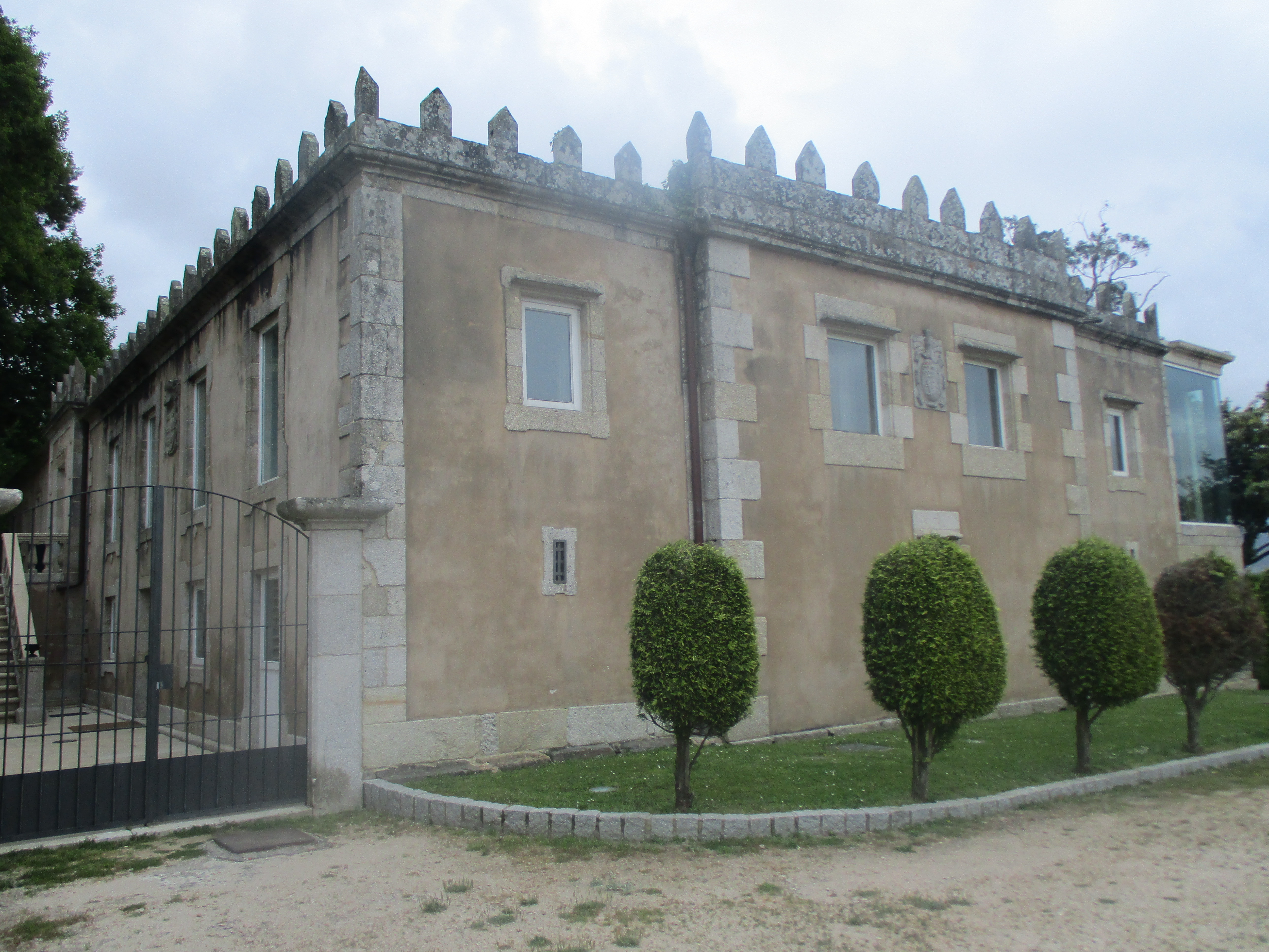 Vista do Pazo de San Roque desde o paseo do parque do mesmo nome.